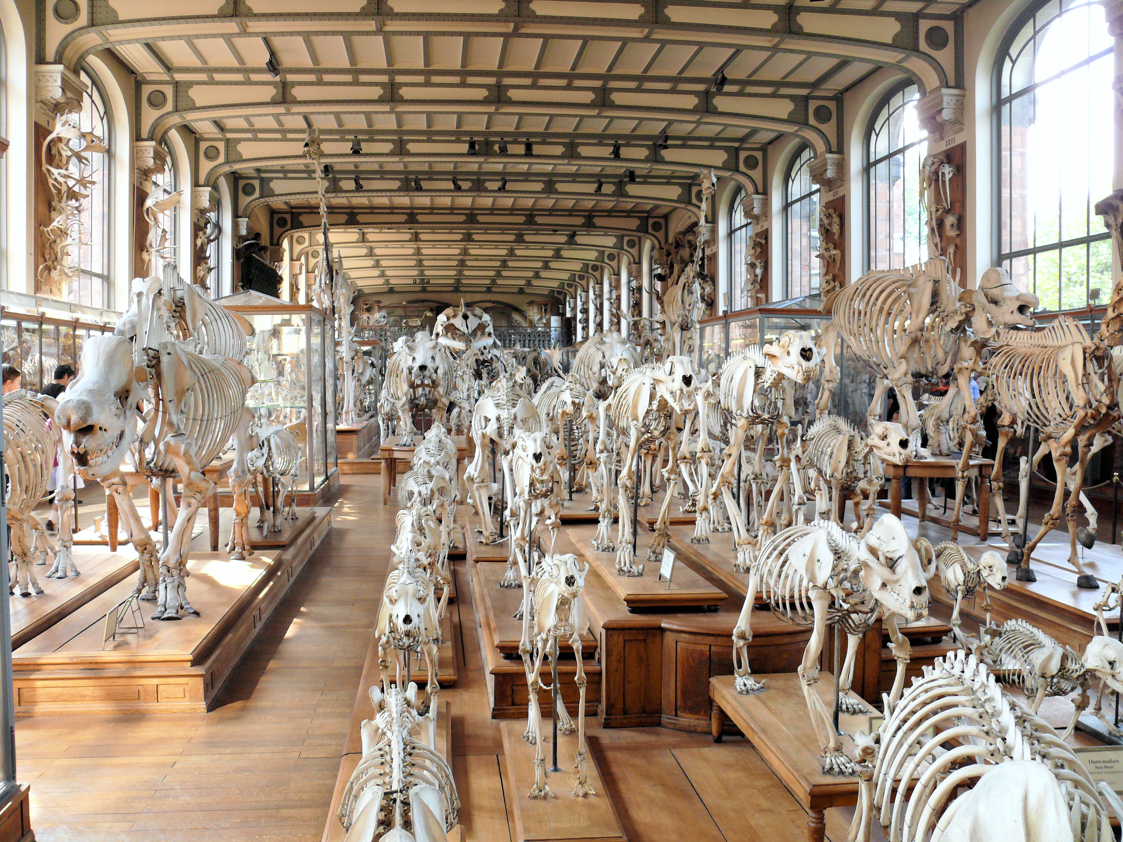 Galerie de paléontologie et d'anatomie comparée - Premier niveau